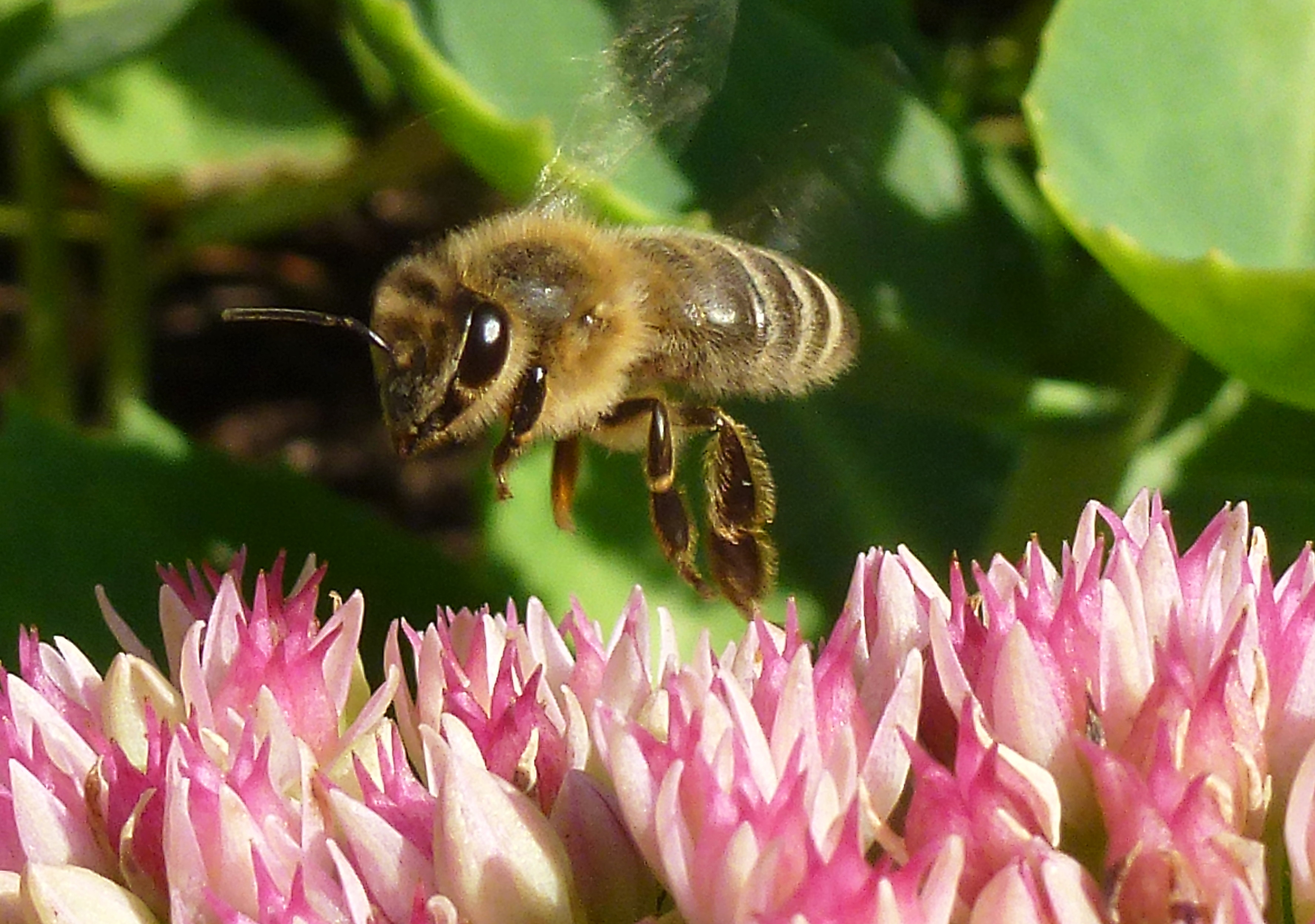 Bi landar på kärleksört